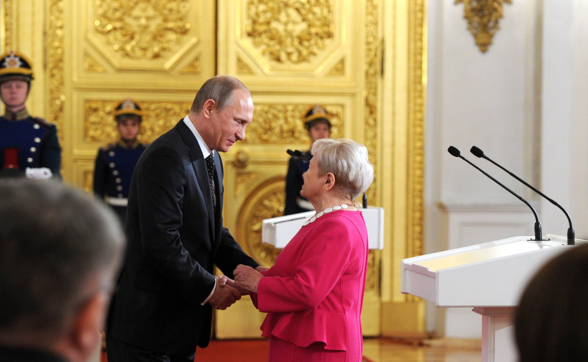 Вручение Государственных премий Российской Федерации за 2014 год. Государственная премия Российской Федерации за выдающиеся достижения в области гуманитарной деятельности 2014 года присуждена Александре Пахмутовой.